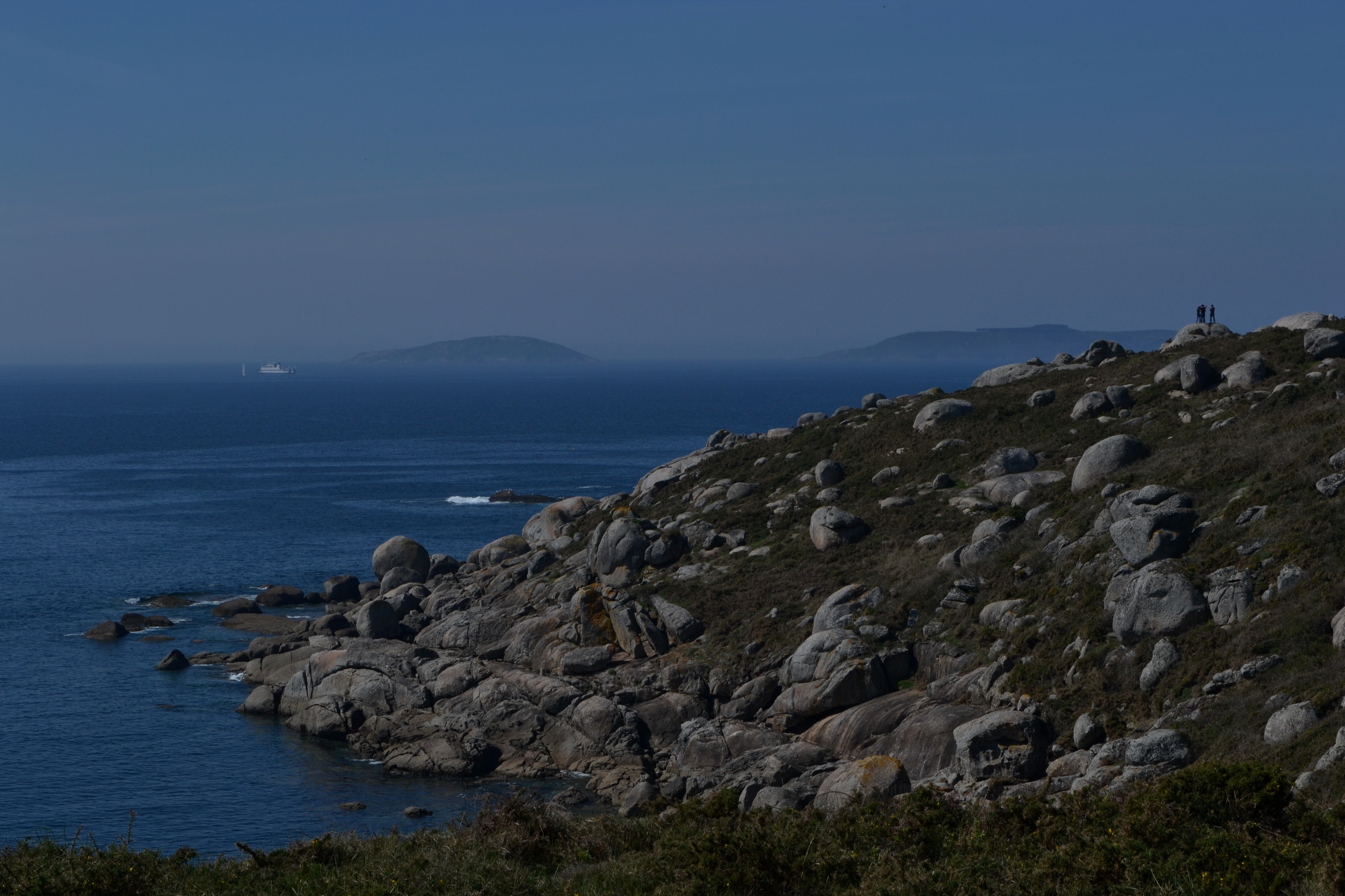 Cabo Udra This is a photography of a Special Area of Conservation in Spain with the ID: ES1140009. Natura2000 entry, EEA entry